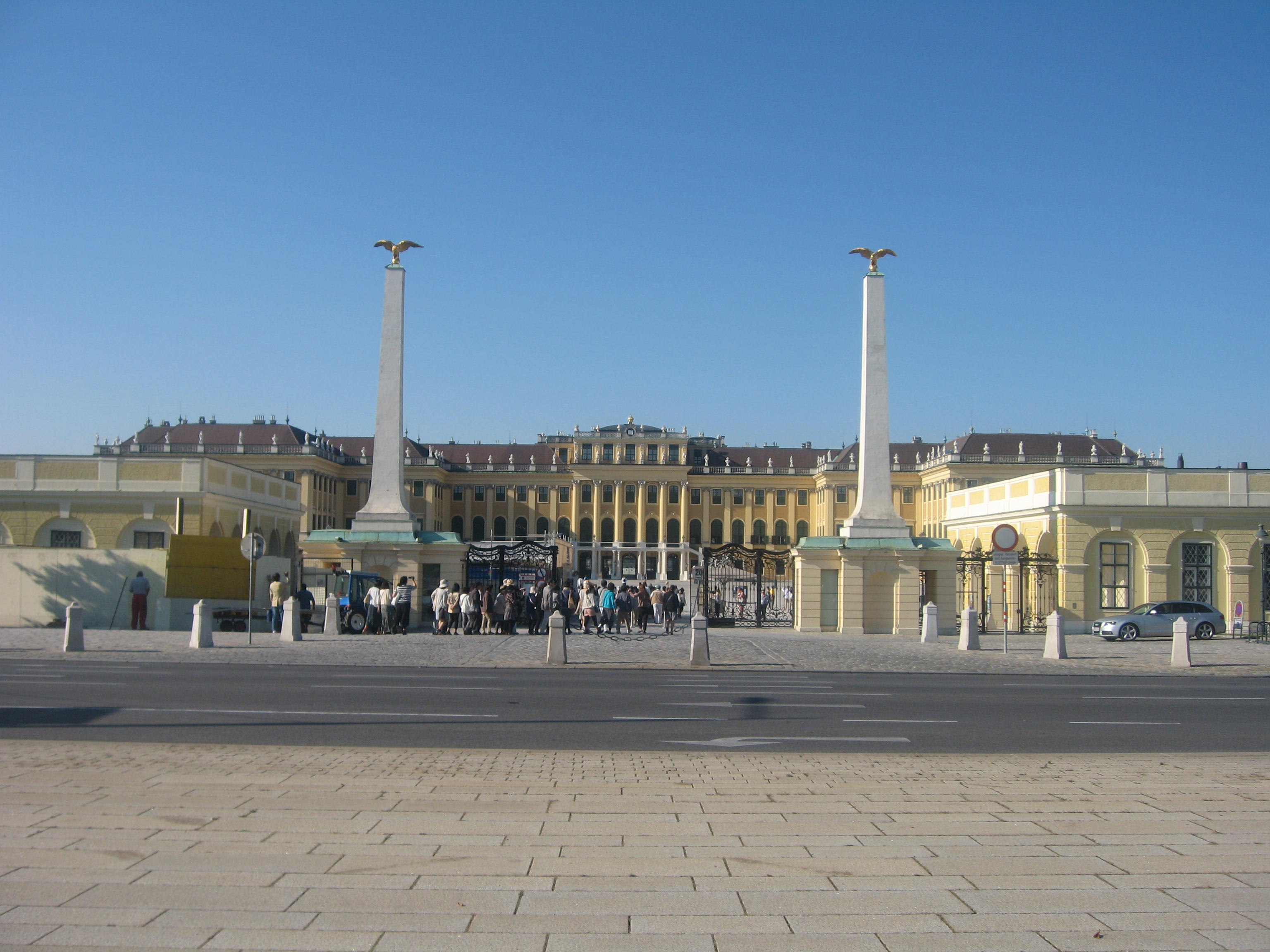 Palatul Schönbrunn